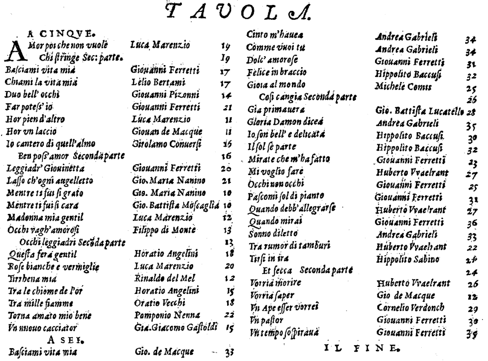 Table de matières du recueil Symphonia angelica, publié par Pierre Phalèse et Jean Bellère, qui contient 55 madrigaux italiens de, entre autres, Giovanni de Macque, Luca Marenzio, Giacomo Gastoldi, Orazio Vecchi et Hubert Waelrant.